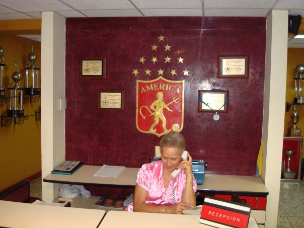 Adentro de la sede